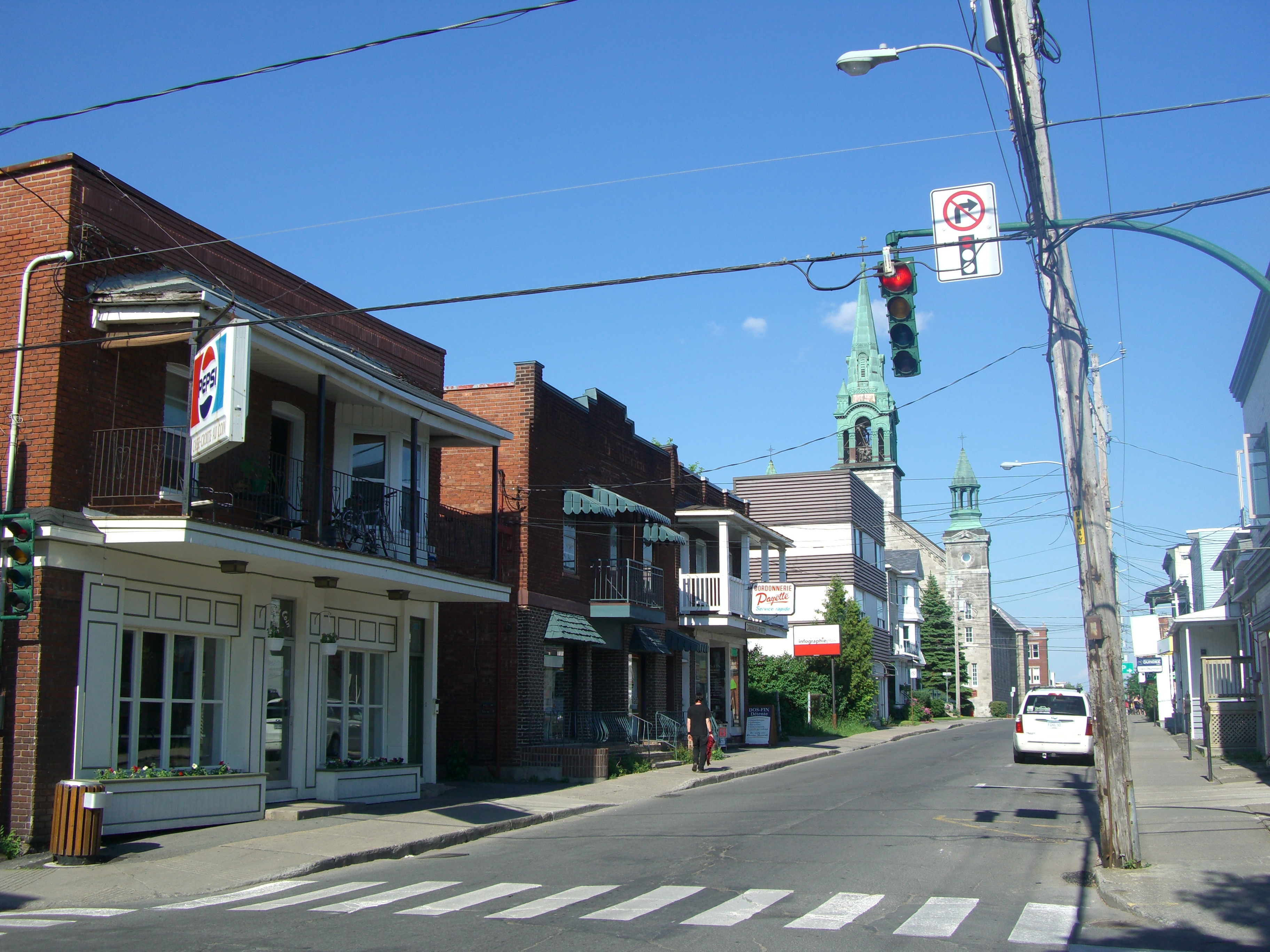 Vue du centre-ville de Saint-Jean-sur-Richelieu (11-06-2007)